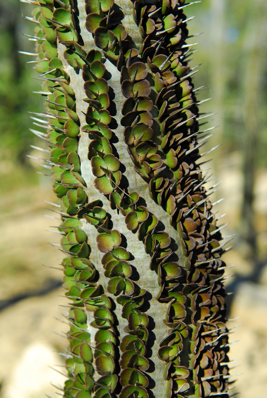 Allaudia procéra endémique au bush